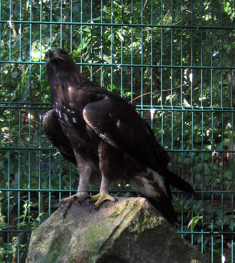 Description/Beschreibung: Steinadler (Aquila chrysaetos) Author/Fotograf: Darkone, 23. September 2004